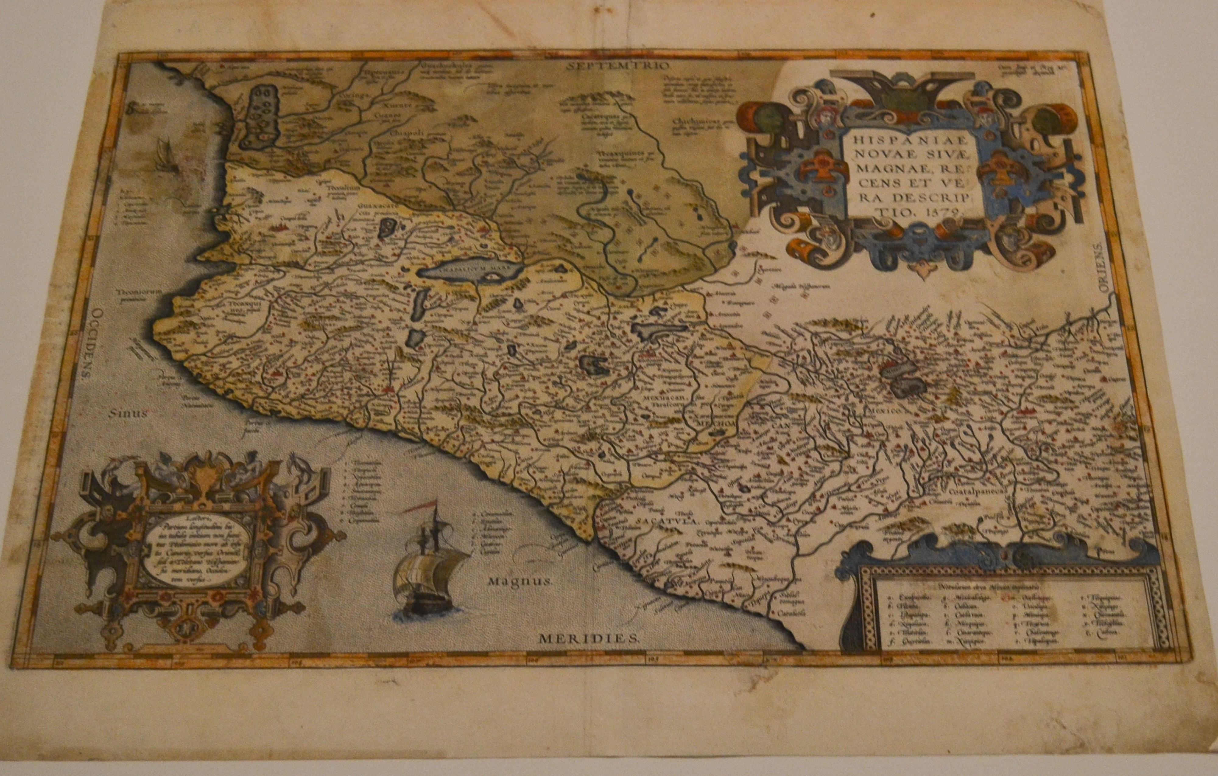 Mapa de Nueva España. Grabado de 1579 de Abraham Ortelius. Muse de América nº inv. 00425.